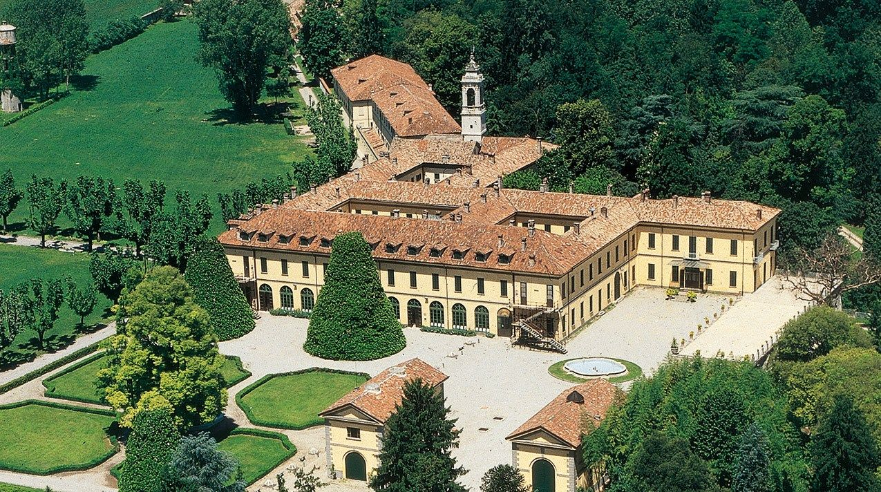 esterno della villa